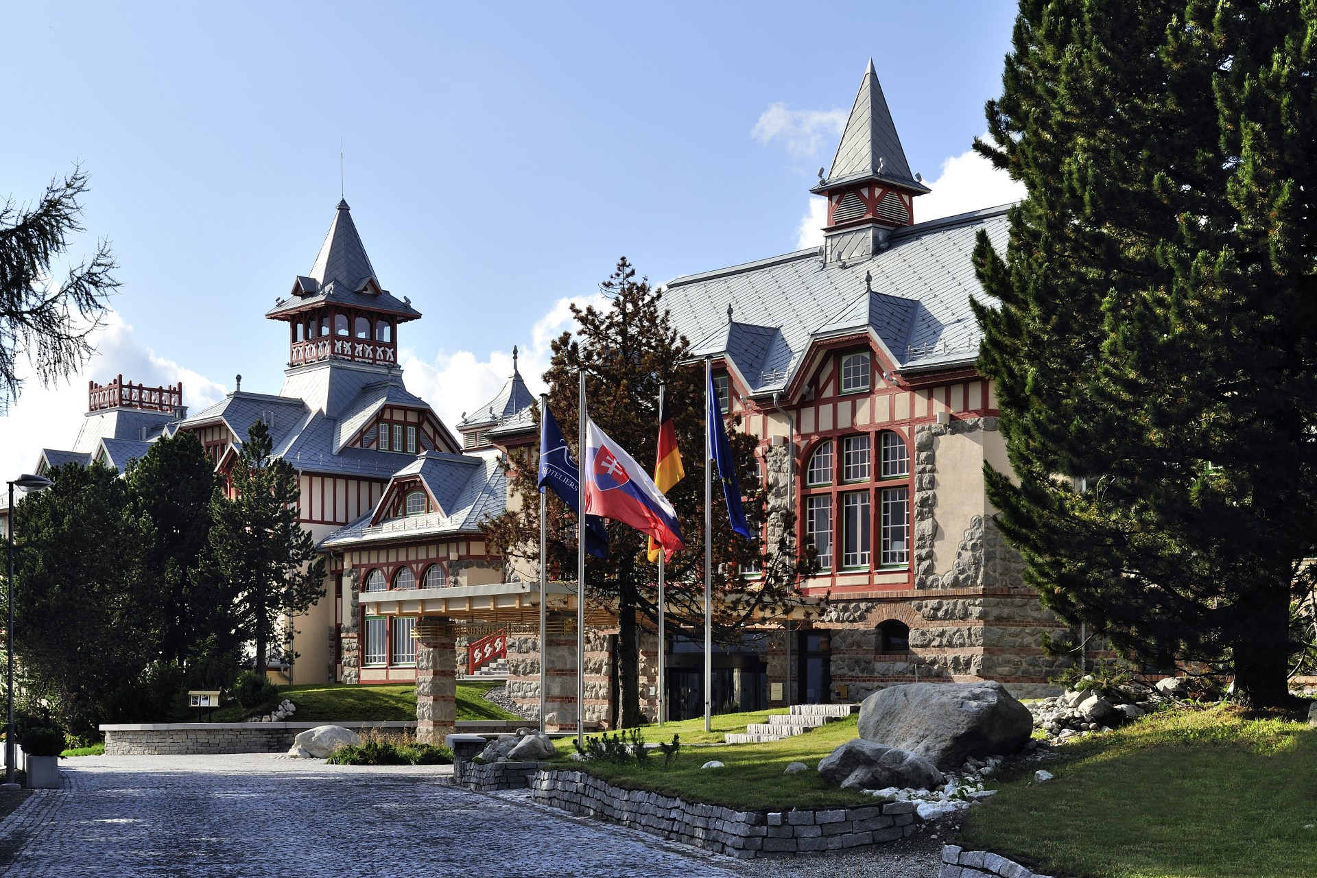 Hlavná budova hotela Grand Hotel Kempinski High Tatras